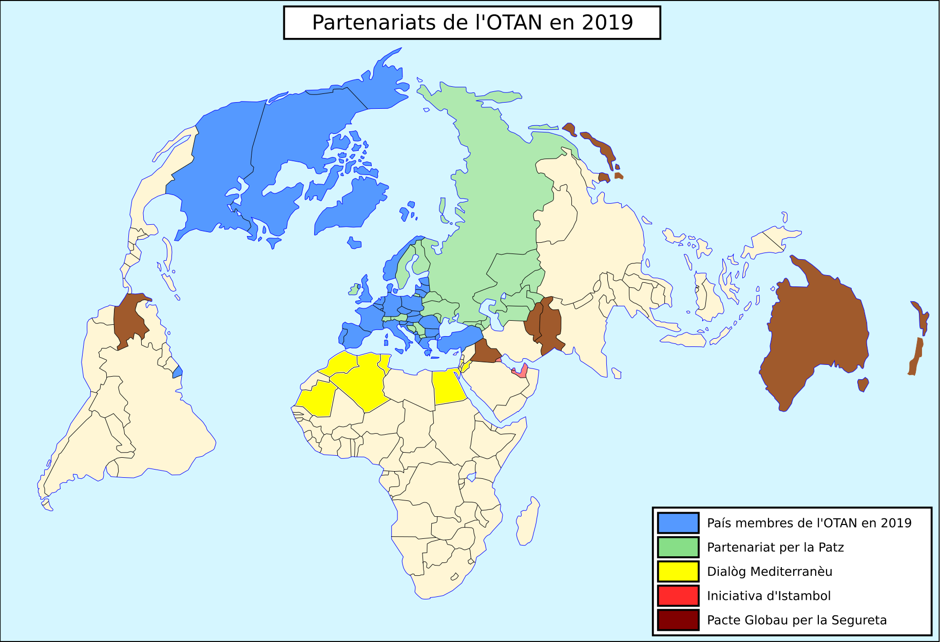 Partenariats principaus de l'OTAN en 2019.